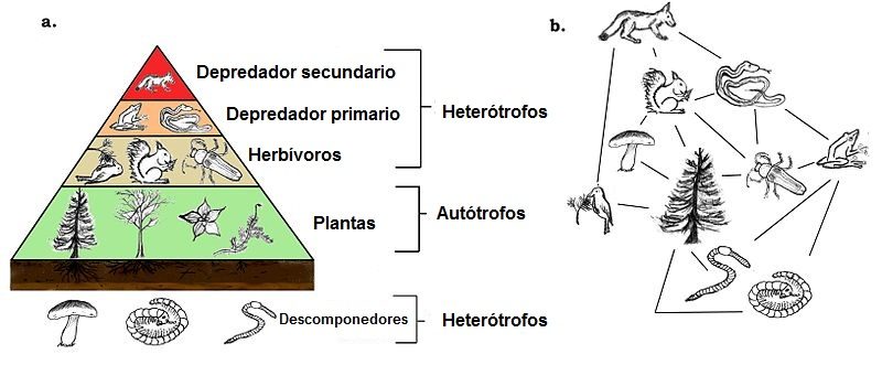 Pirámide trófica e ilustración simple de interacciones en un ecocsistema. Traducido al español de su versión en inglés.